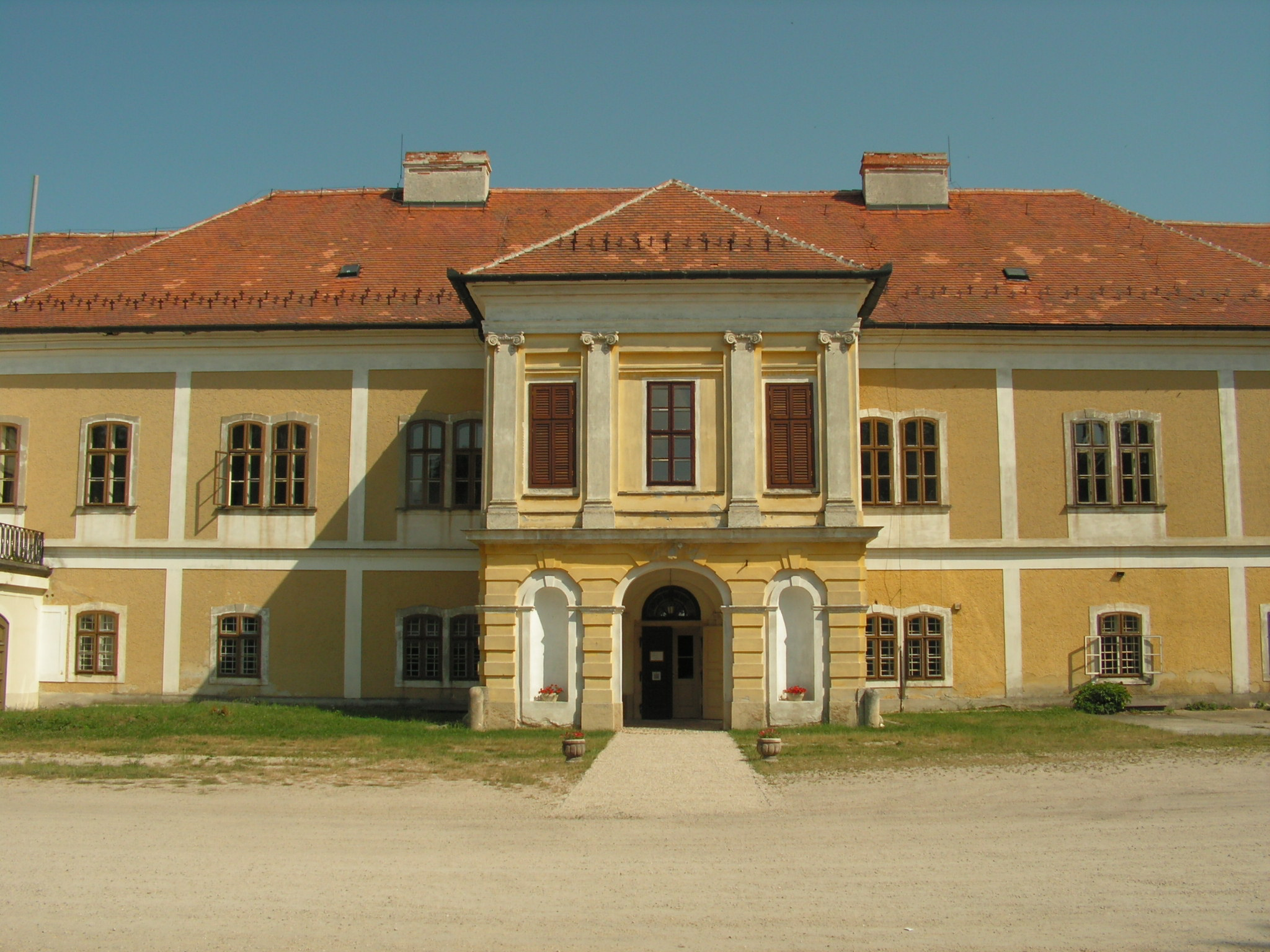 Amadé-Bajzáth-Pappenheim-kastélyegyüttes és parkja This is a photo of a monument in Hungary. Identifier: 3658